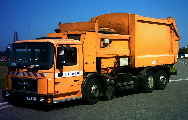 Seitenlader-Müllauto in Wangen im Allgäu